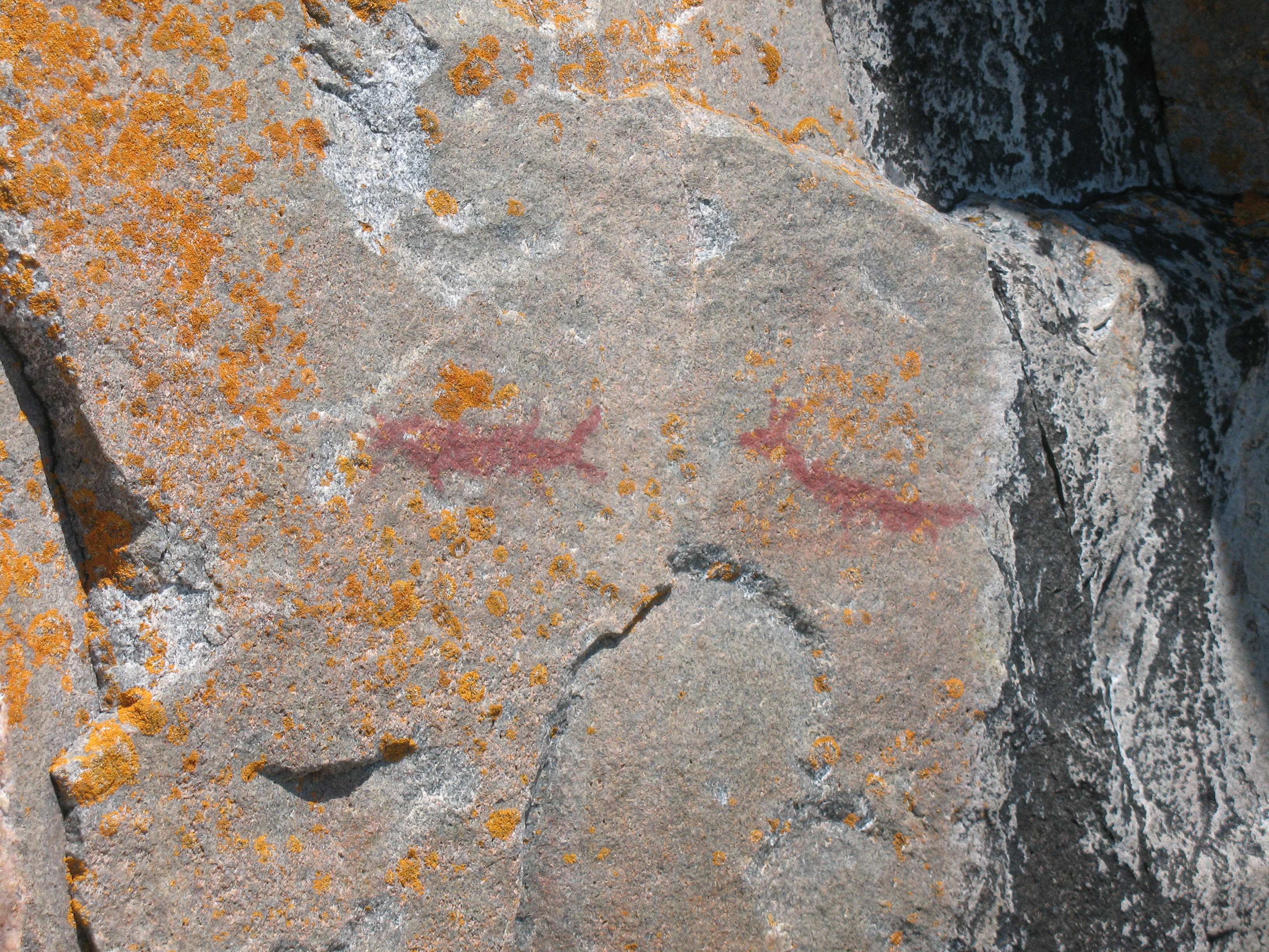 Felszeichnungen unweit des Agawa Rock, Lake Superior, Ontario